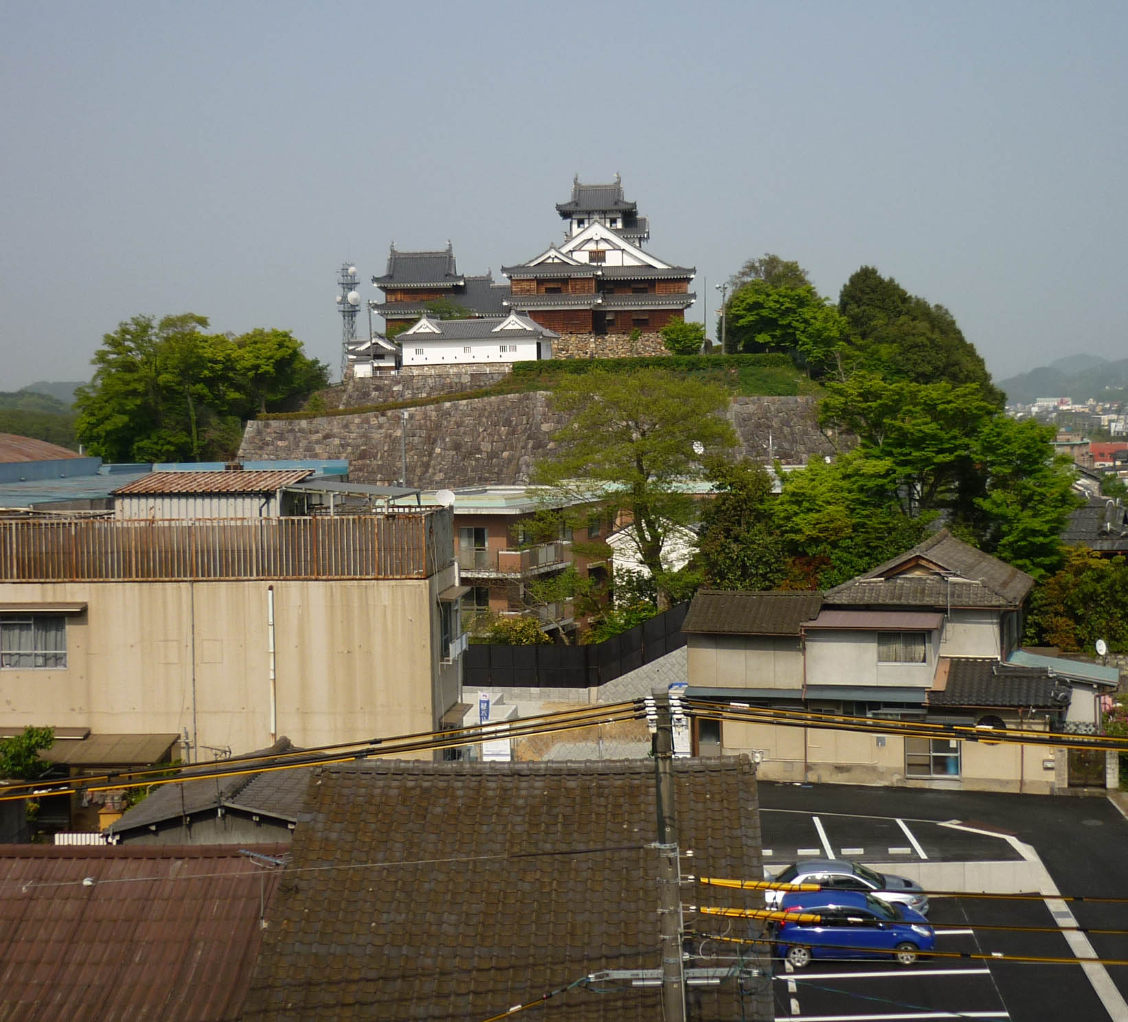 福知山城